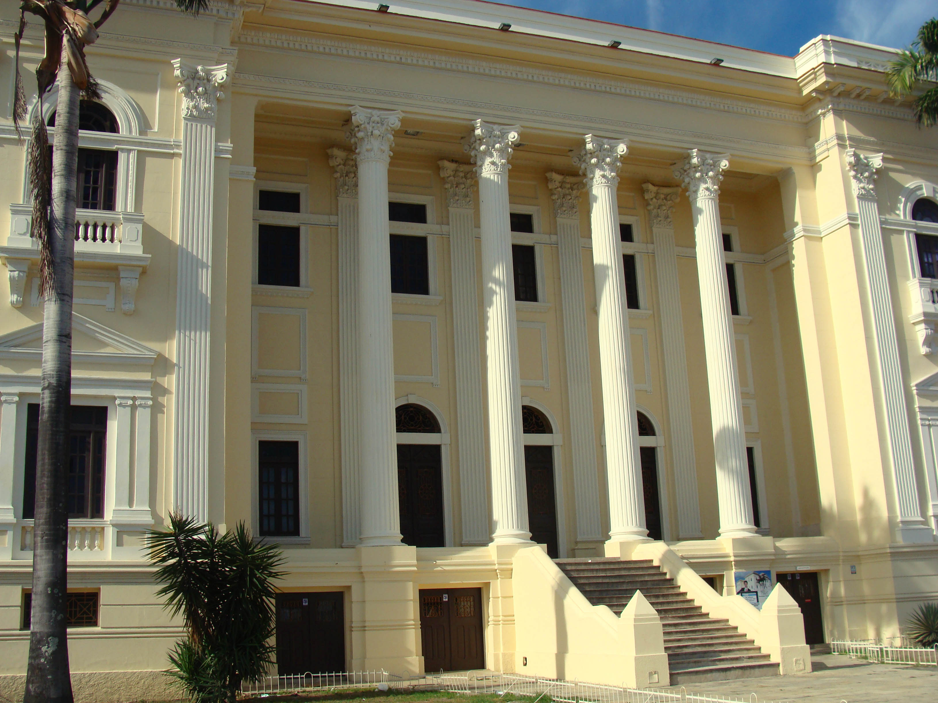 Prédio do Centro comercial de Maceió